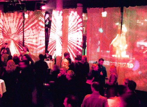 Teddy Award Filmpreisverleihungs-Party im Tempodrom Berlin, Februar 2002. Dekorationen von mir.